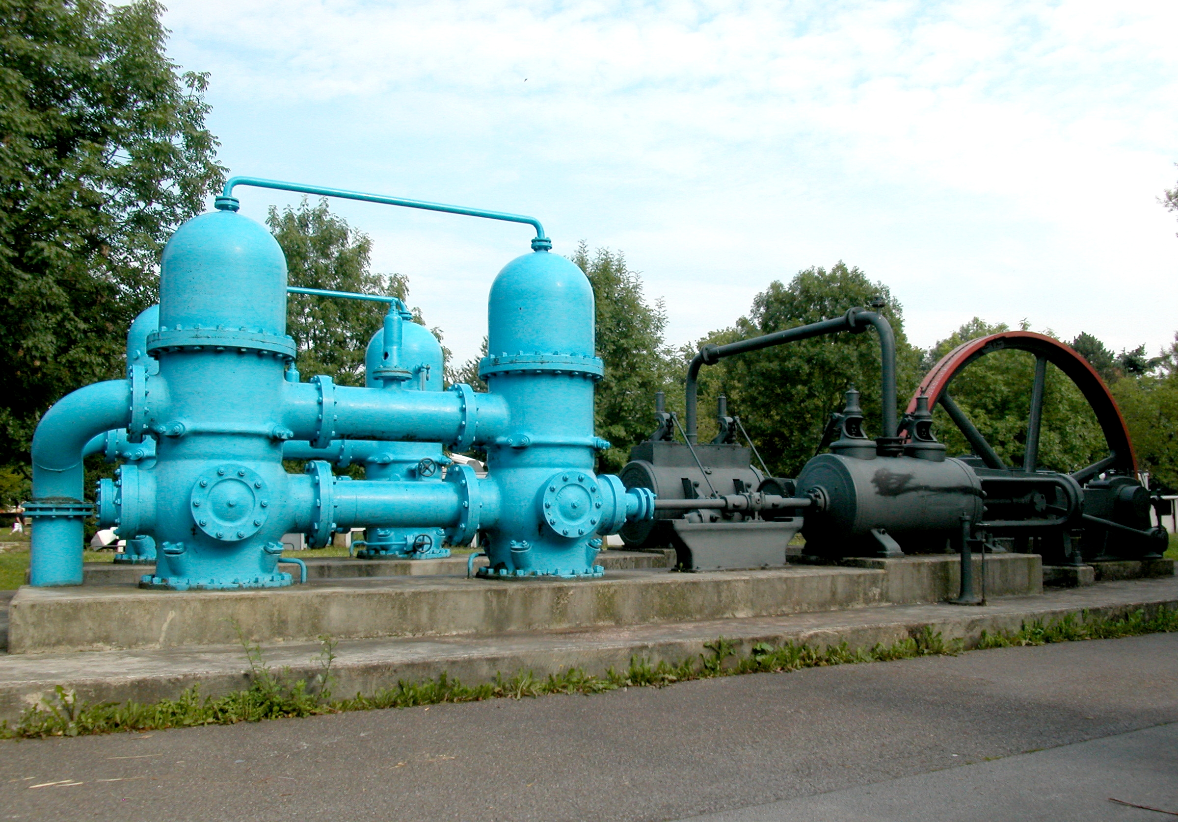 Auf der Schleuseninsel ausgestellte Pumpe